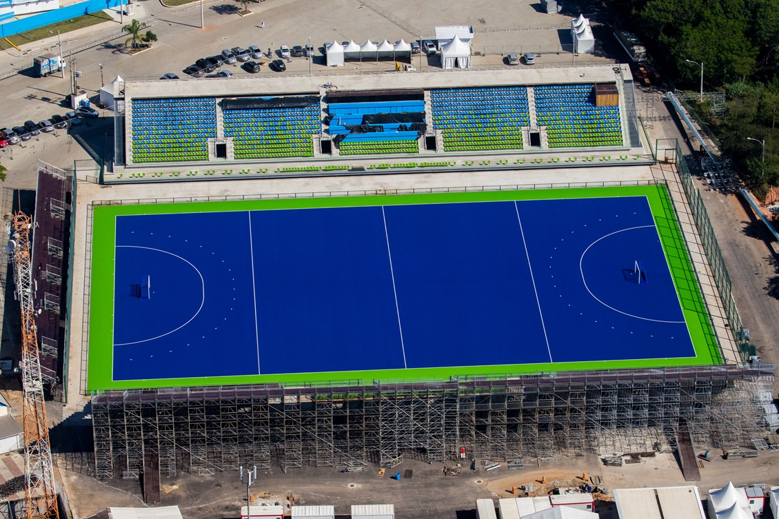 Il campo principale del Centro Nacional de Hóquei di Rio de Janeiro